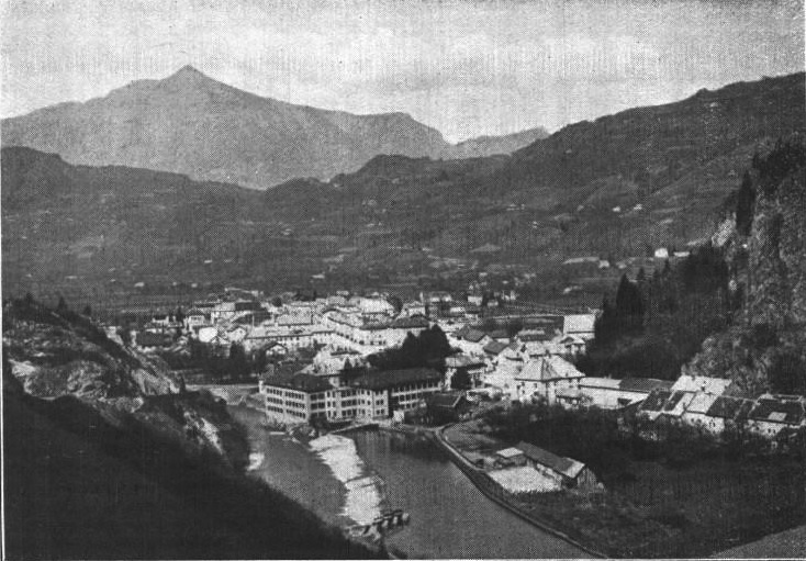 Cluses vue d'Amont. En arrière, pentes dans le Flysch de Châtillon. Photo publiée en : Société scientifique du Dauphiné, Bulletin de la Société de statistique, des sciences naturelles et des arts industriels du département de l'Isère, Grenoble, T. 48, ser. 5, 1927. ISSN 20221312. Source : Bibliothèque nationale de France, département Centre technique du livre, 2008-49025